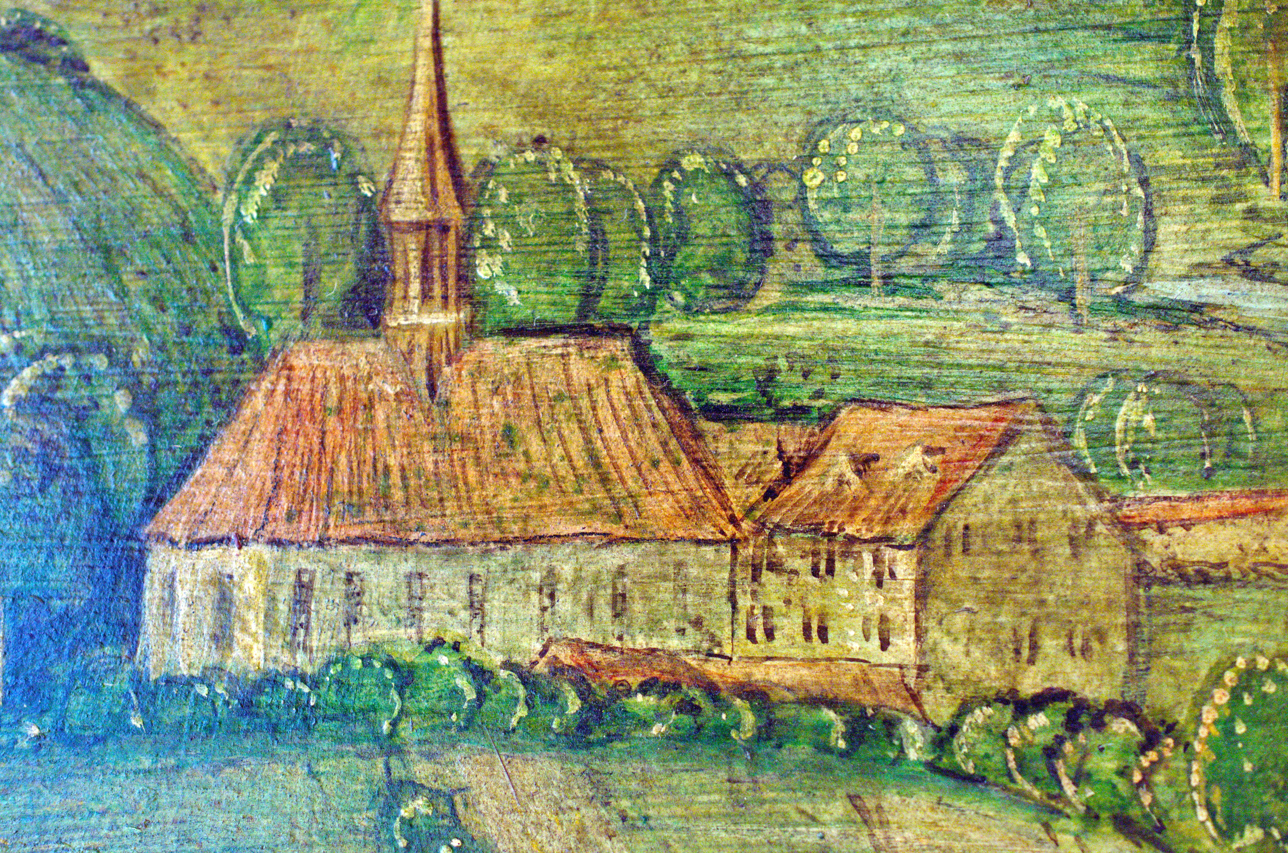 Das Kloster Selnau auf der Replik der Altartafeln von Hans Leu im Baugeschichtlichen Archiv der Stadt Zürich im Haus zum Rech. Die Panoramansicht des linksseitigen Limmatufers – 'Standort' der BetrachterIn ist wohl der Karlsturm des Grossmünsters – von Hans Leu d. Ä. gilt als die älteste zuverlässige Darstellung der Stadt Zürich, Ende des 15. Jahrhunderts auf den Altartafeln im Grossmünster mit viel Liebe zum Detail festgehalten. Die originalen Tafeln sind heute im Landesmuseum ausgestellt, eine (vermutlich) 1:1 Replik ist im Stadtarchiv öffentlich zugänglich.